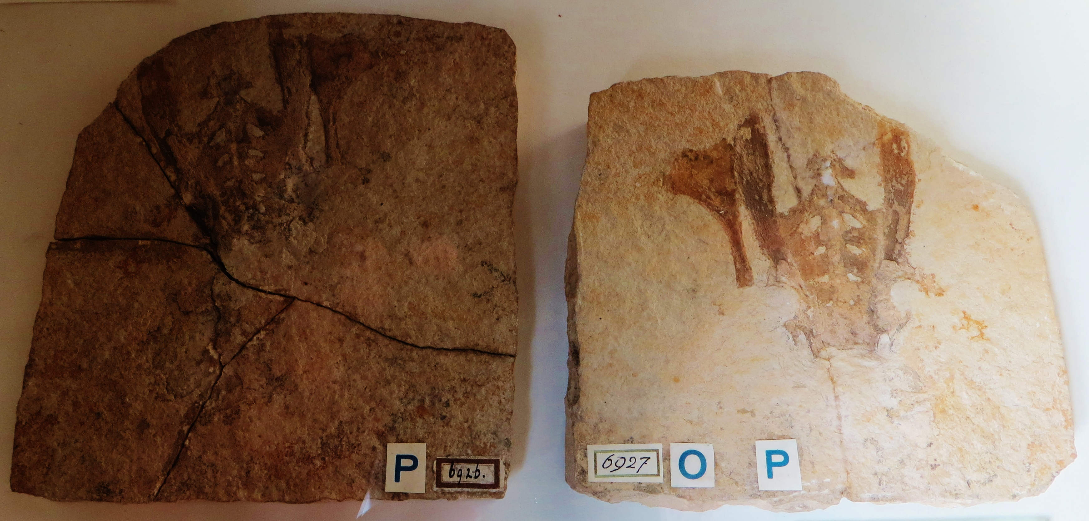 Fossil of Pterodactylus, an extinct reptile - Took the picture at Teylers Museum, Haarlem